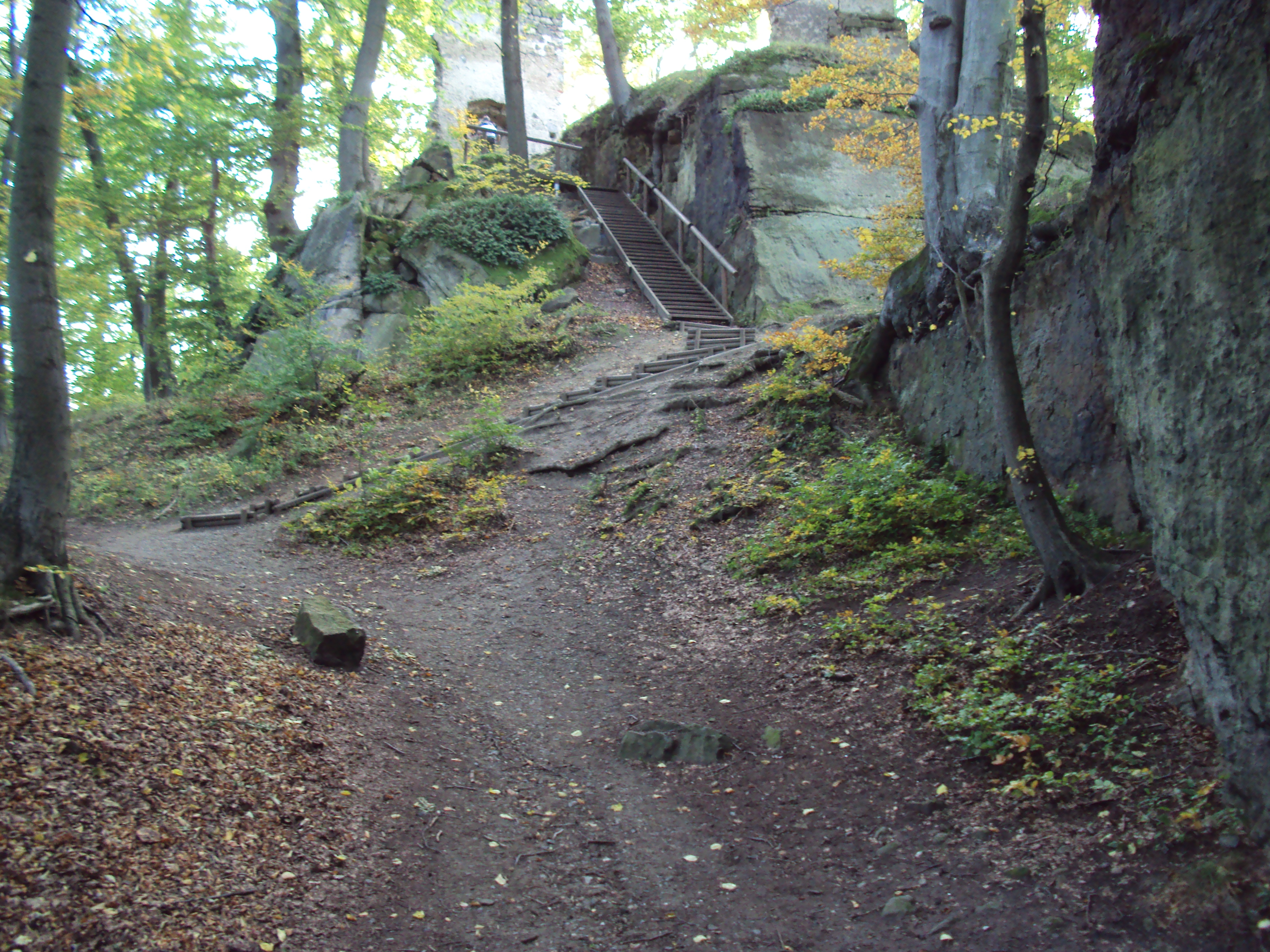 Zřícenina hradu Děvín u Hamru na Jezeře, horní partie